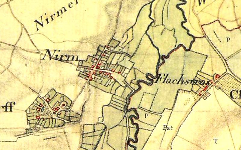 Kartenaufnahme der Rheinlande 1803-1820